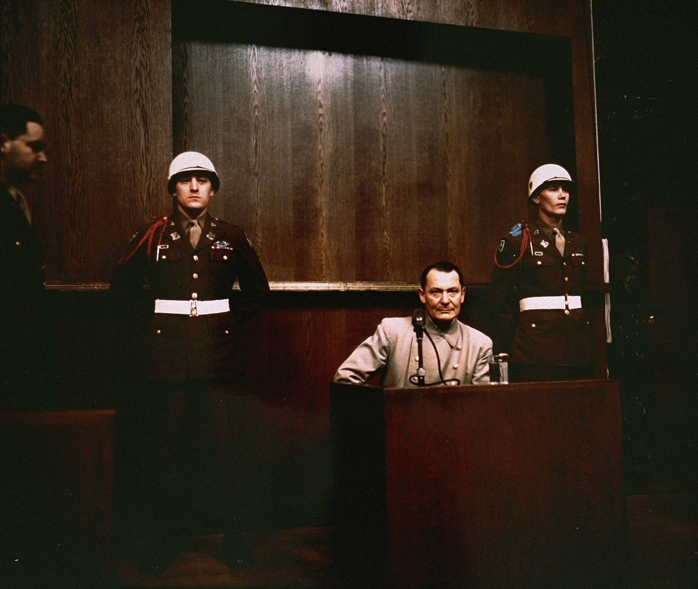 Beskrivning: Hermann Göring vid krigsförbrytarrättegången 1945-1946 Datum: Mar 1946 Plats: Nürnberg, Bayern, Tyskland Foto: USHMM, courtesy of National Archives and Records Administration, College Park Copyright: Public Domain ID: #61325